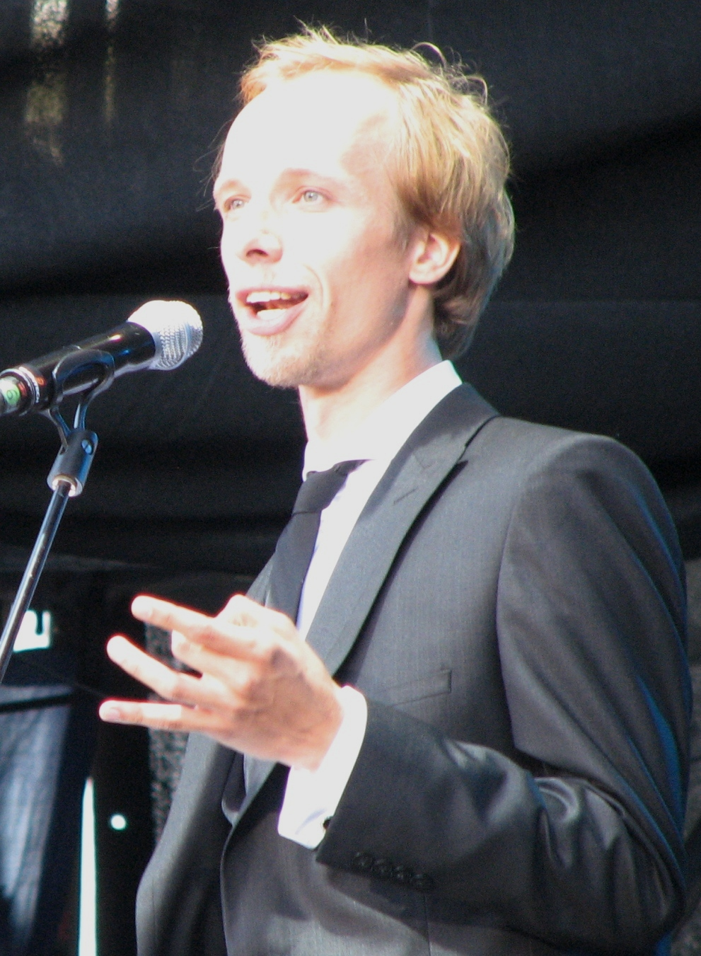 Nero Urke juhtimas Vabaduse Laulu